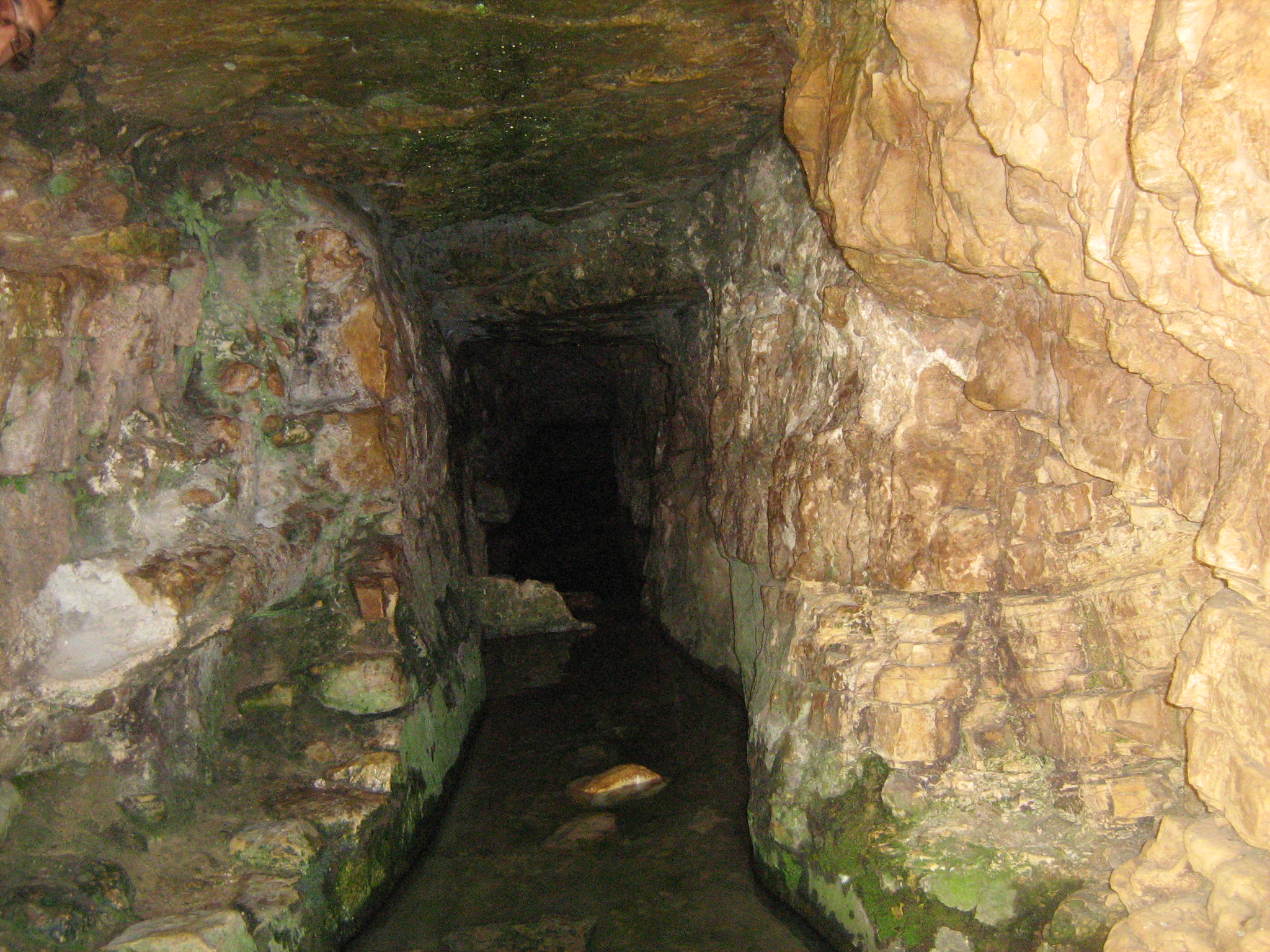 עין חנדק